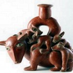 origen